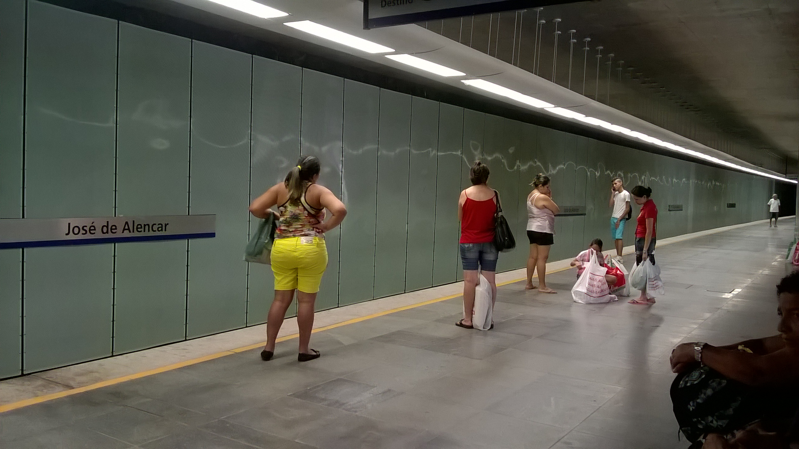 Plataforma da estação José de Alencar da Linha Sul do metrô de Fortaleza